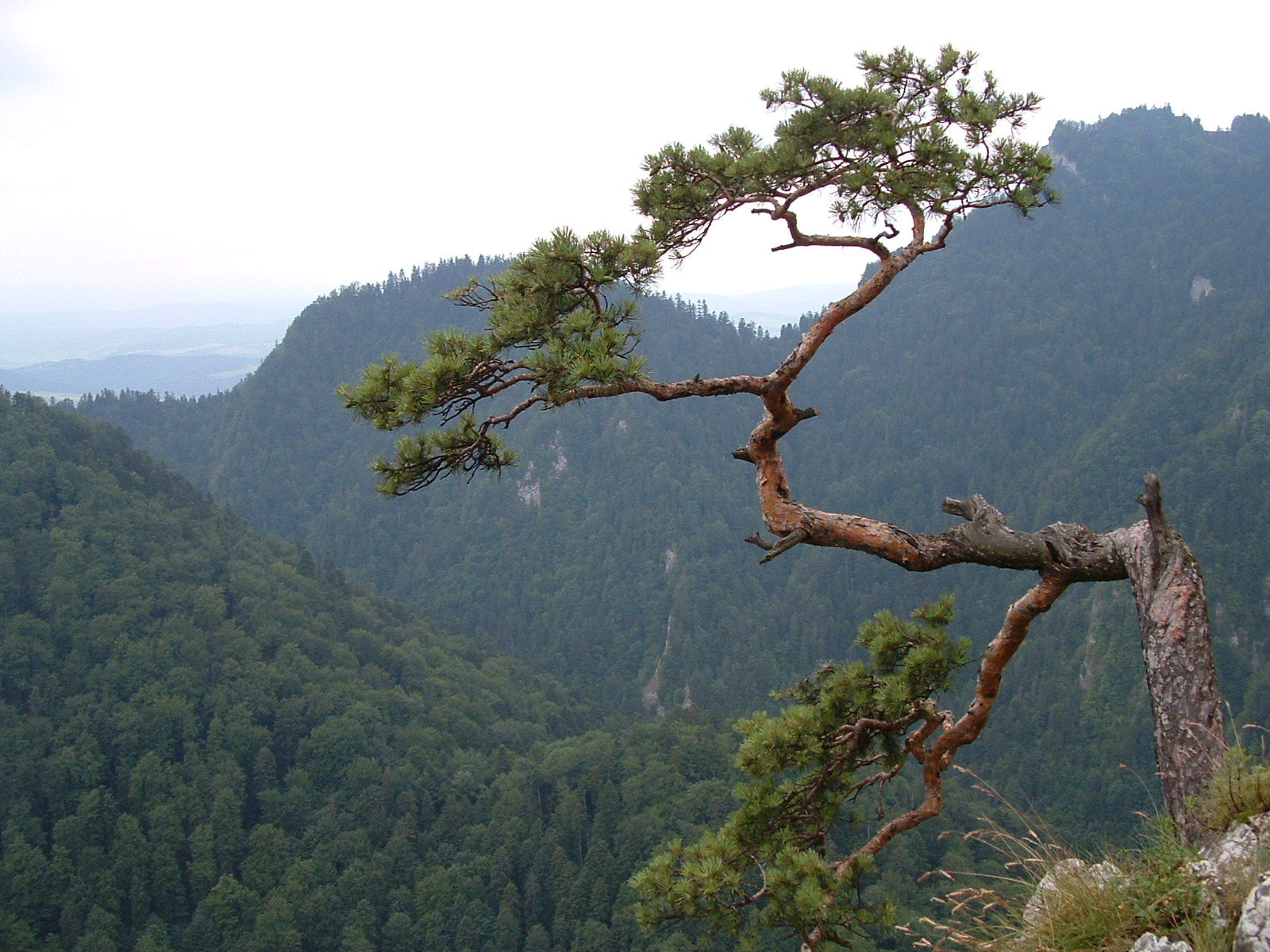 Sosna reliktowa na Sokolicy